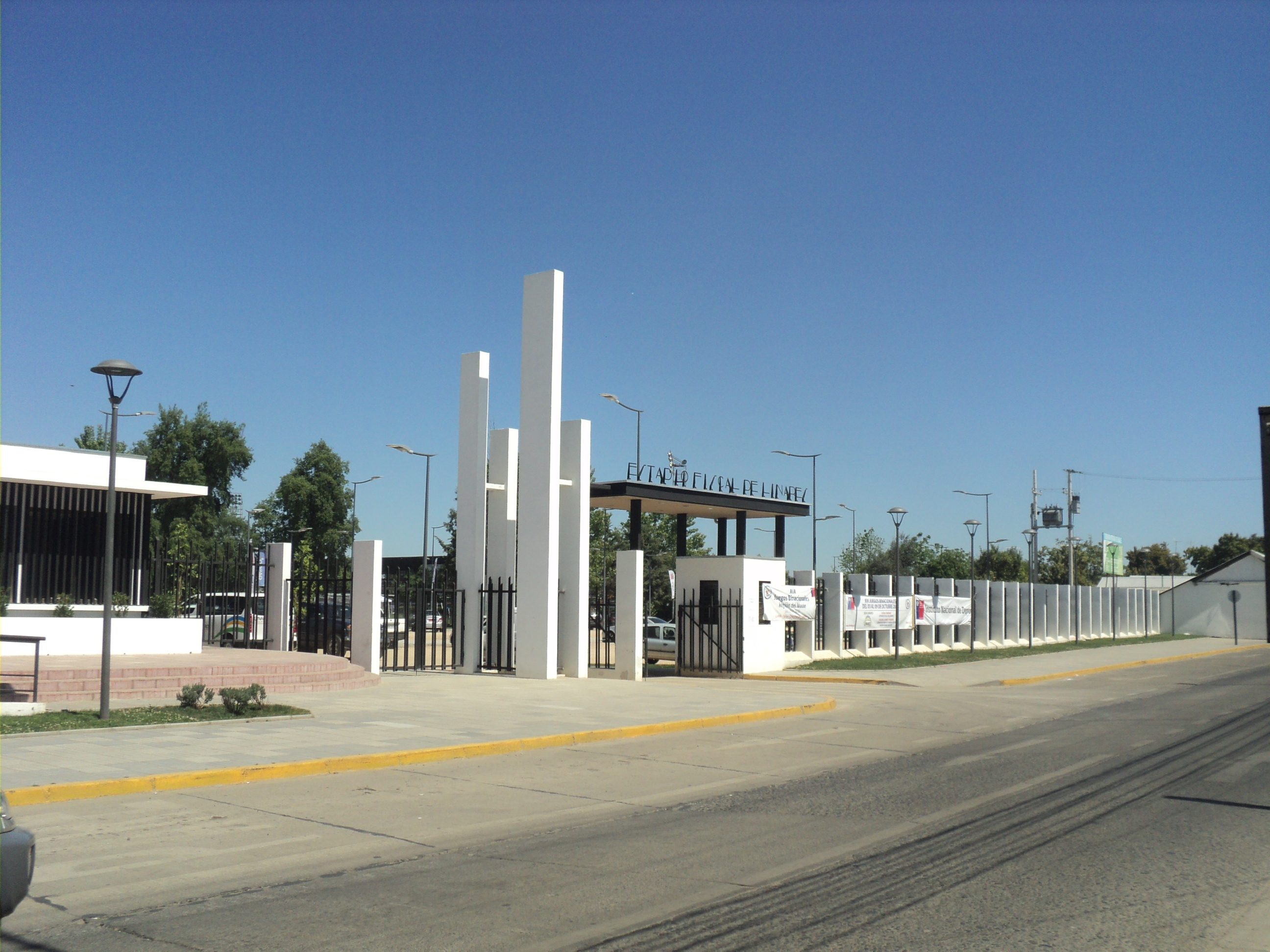 Entrada al Estadio Municipal "Tucapel Bustamante" de Linares, reconstruida y reinaugurada en 2014.